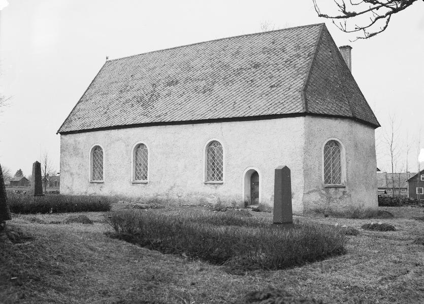 Kyrkan från sydöst.